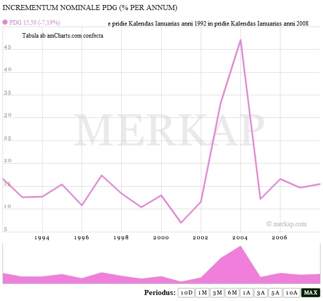 PDG nominale Rei publicae Dominicianae